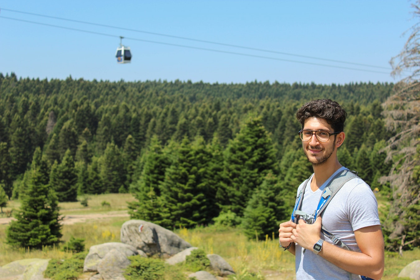 Backpacker im Uludağ Gebirge